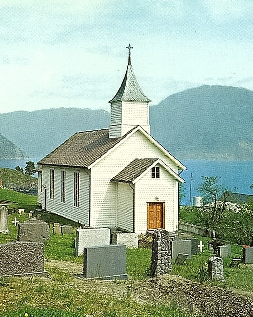 ukjent kirke, sannsynligvis i Bjørgvin bispedømme